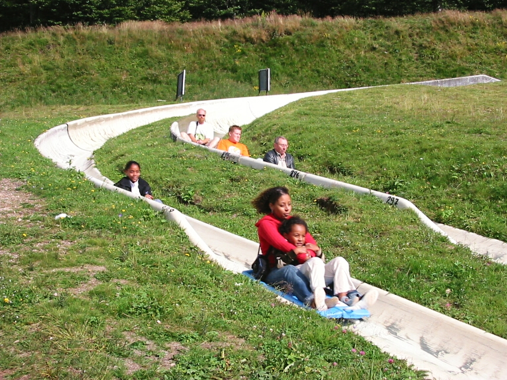 Luge d'été (Summer luge) Col de la Schlucht (Le Valtin, Vosges)